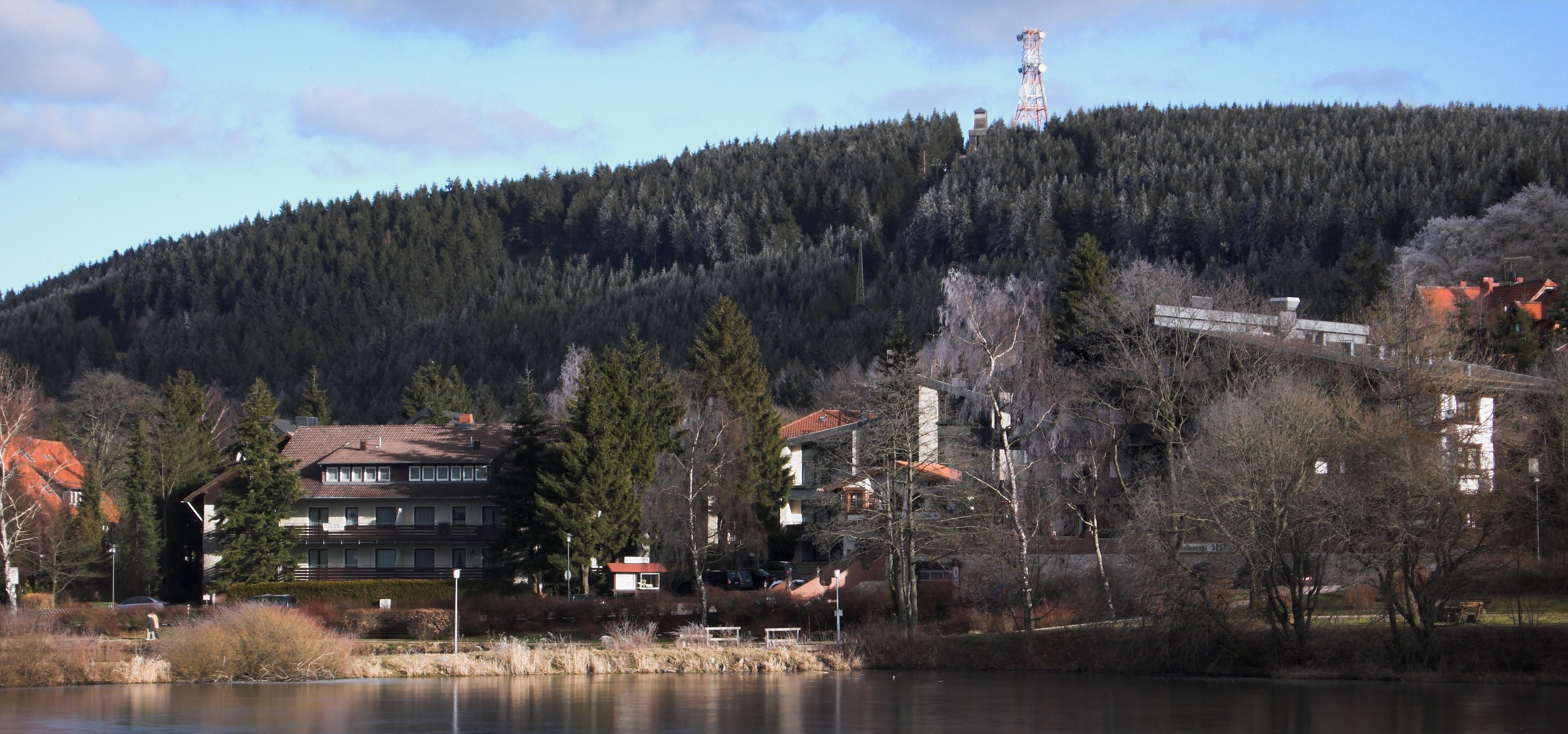 Hahnenklee mit dem Bocksberg im Hintergrund und dem Kranicher Teich im Vordergrund